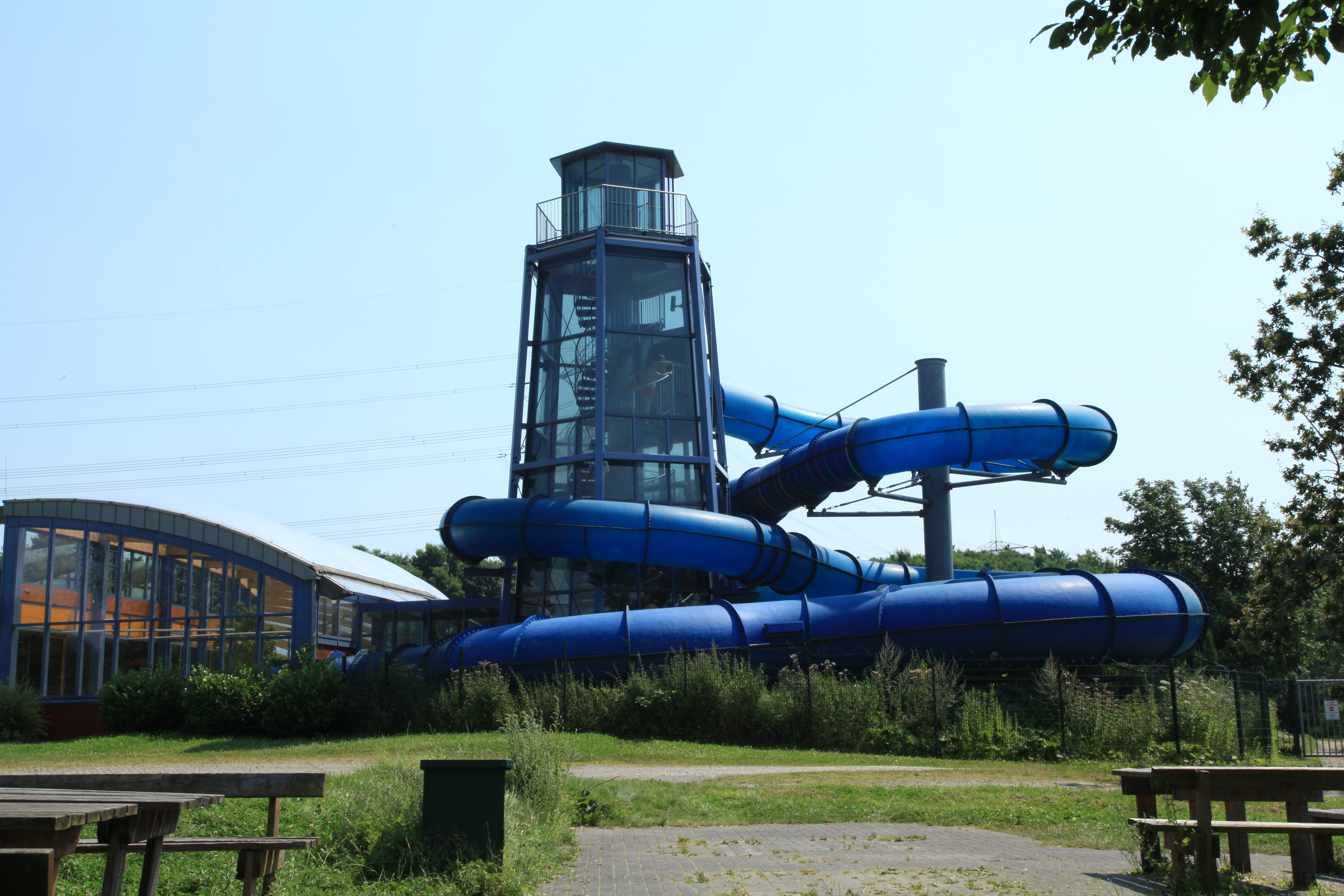 Freizeitbad Heveney, Querenburger Straße, am Ufer des Kemnader Sees in Witten